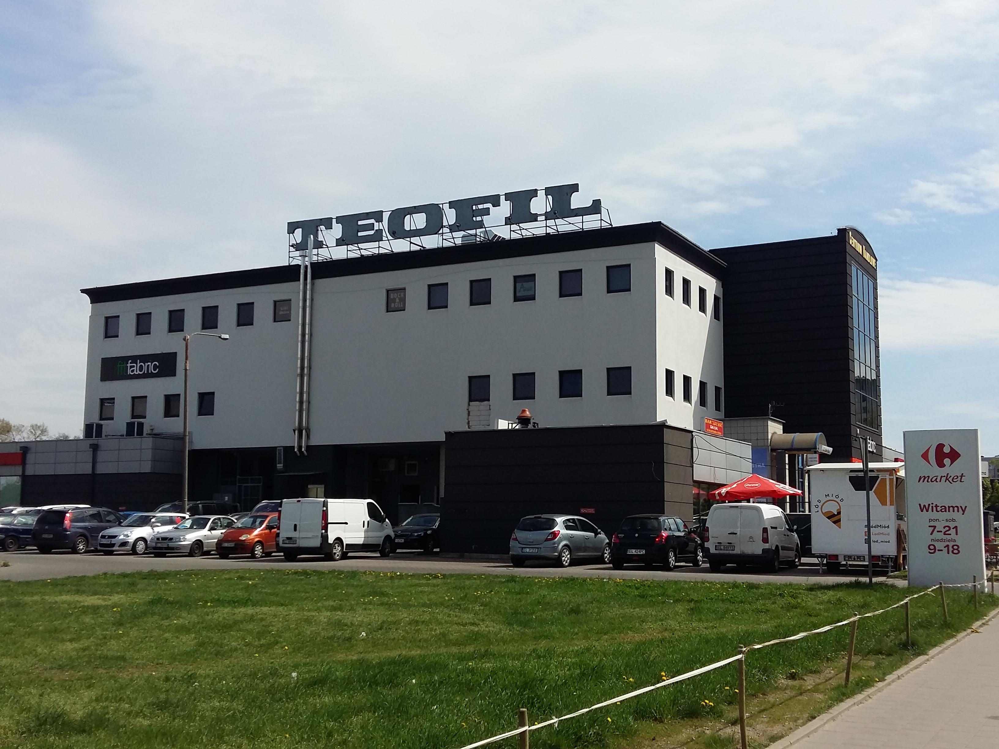 Łódź, Centrum Handlowe "Teofil" (dawniej Dom Handlowy), w kwietniu 2018 roku.